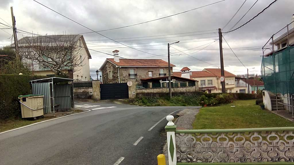 Vista de Pazos, Ferro.